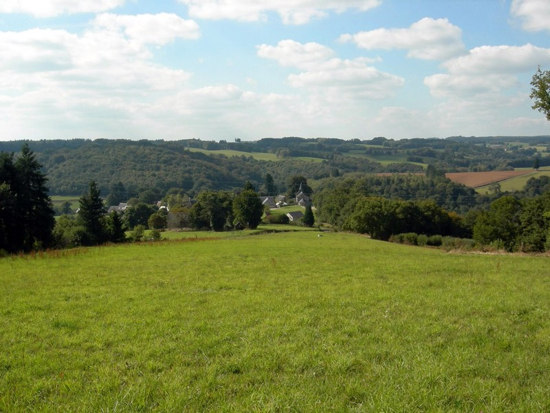 Vue su village de Soudaine Lavinadière